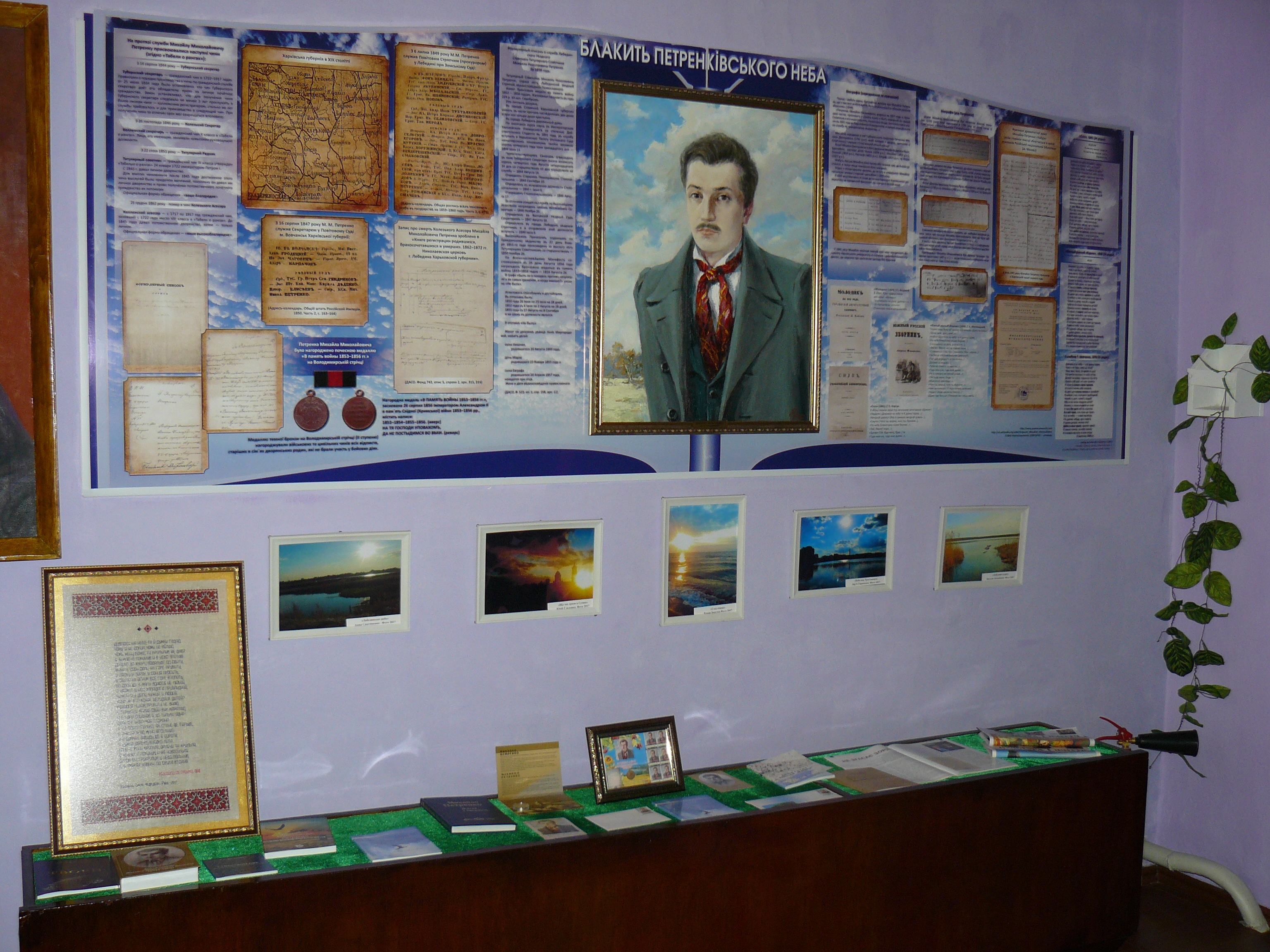 Історико-краєзнавчий музей у Лебедині